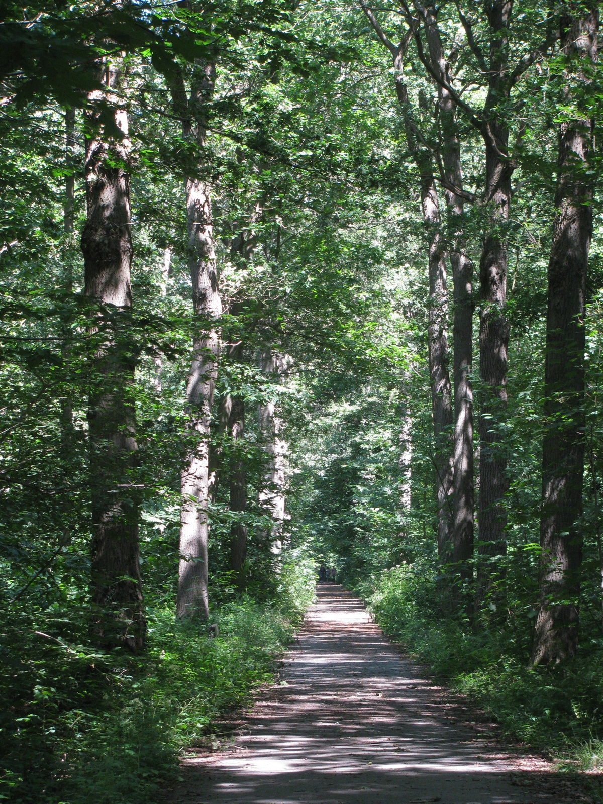 Het Leen